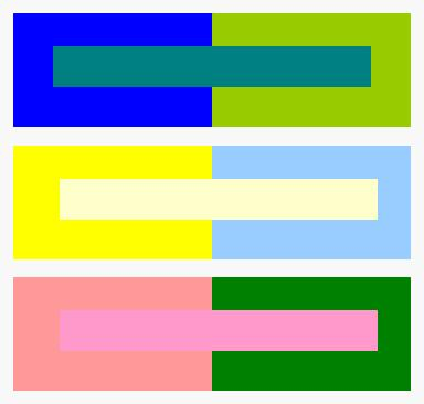 Beispiel Simultankontrast